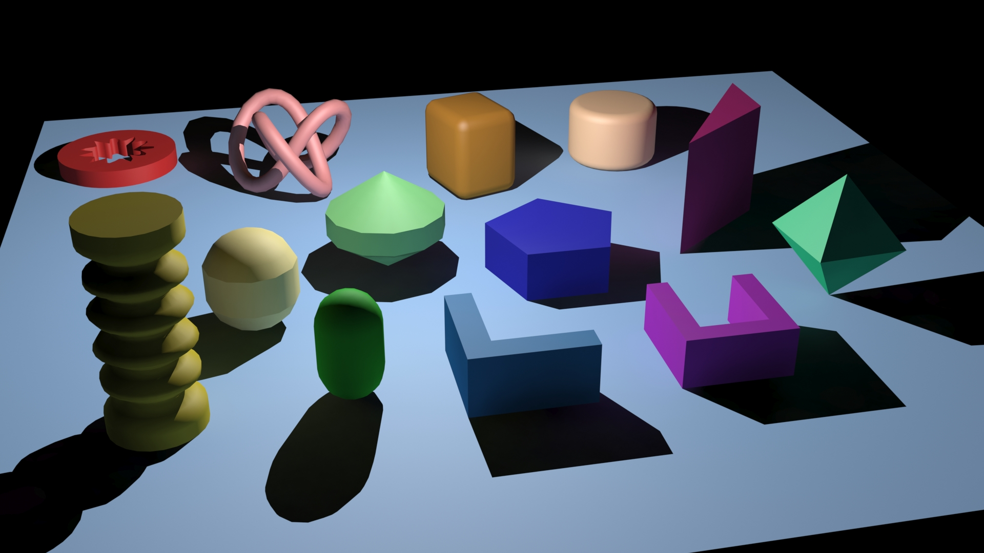 Razširjena primitivna telesa